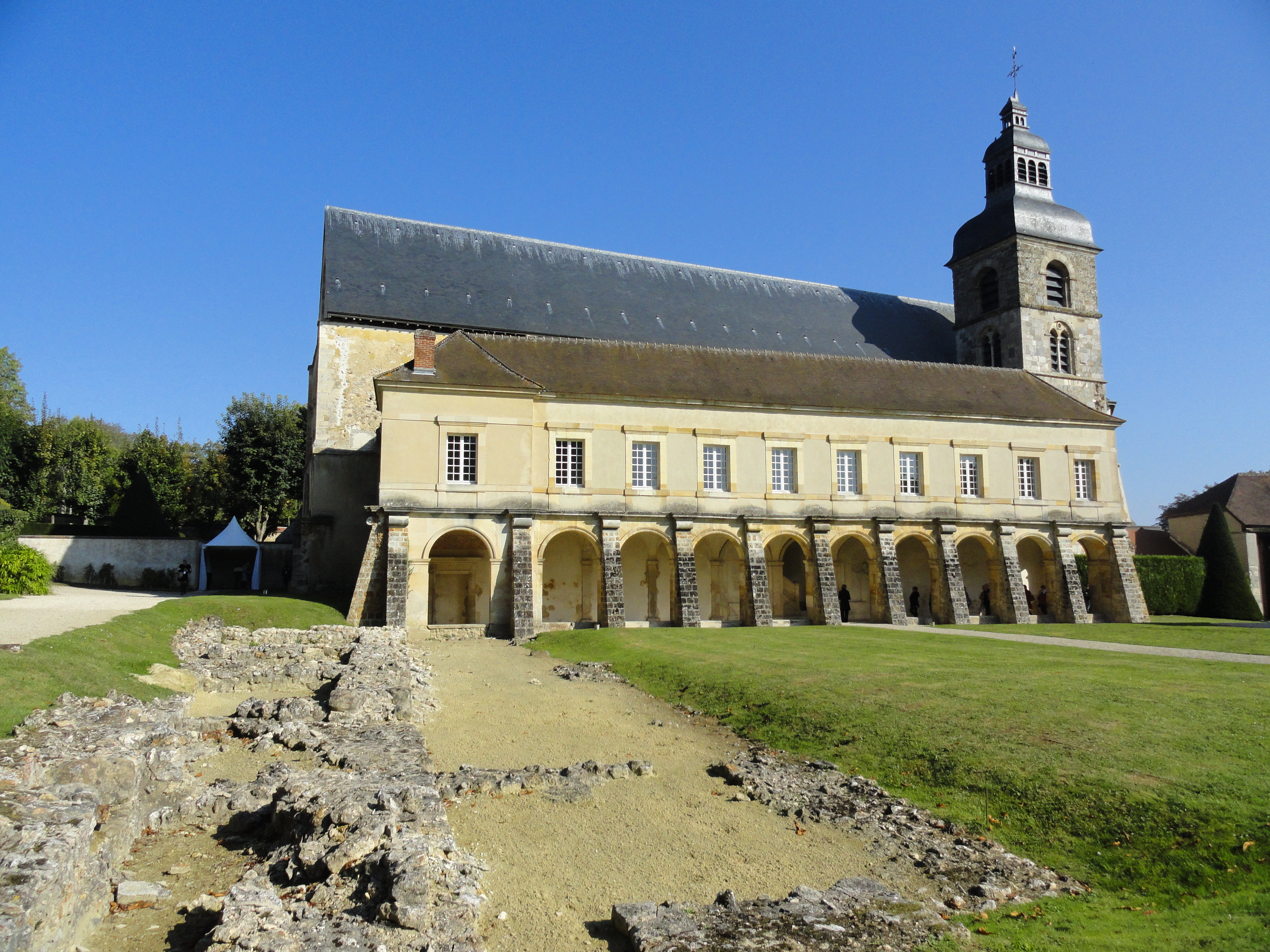 Vue de l'église abbatiale et du cloître de l'ancienne abbaye et des vestiges d'une aile de la-dite abbaye.